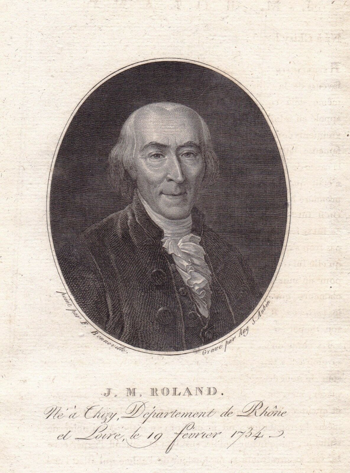 J.M. Roland : né à Thizy, département de Rhône et Loire, le 19 février 1734, estampe.